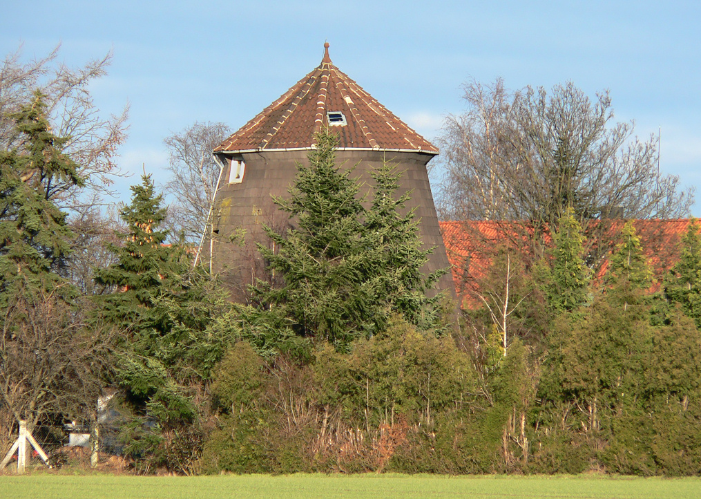 Holländer Windmühle bei Harkenbleck